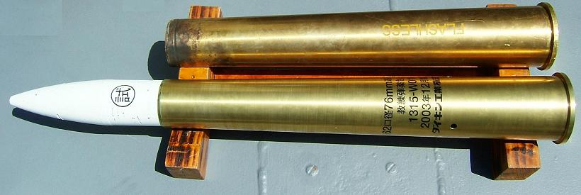 日本海上自衛隊護衛艦62口径76mm速射砲教練弾。